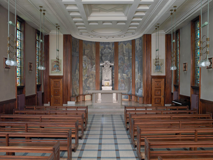 Chapelle réalisée par Georges Curtelin qui montre un gout marqué pour l'art décoratif